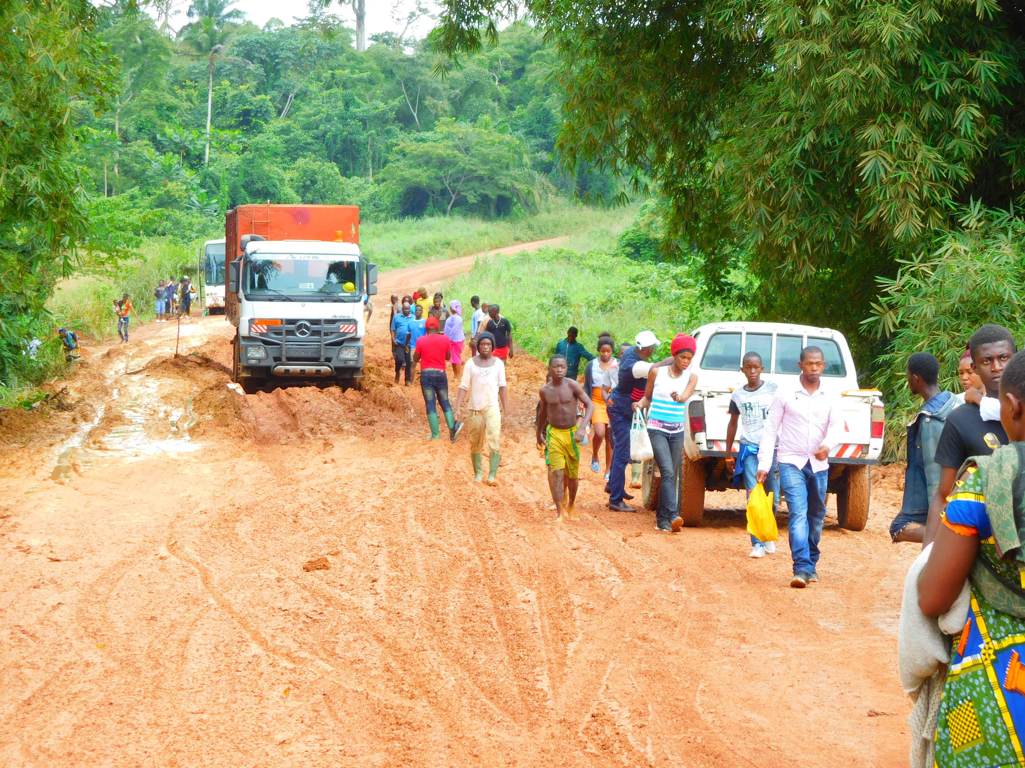 Cameroun : la route nationale 3 reliant Yaoundé à Douala, près de l'embranchement vers Eséka, à la saison des pluies.